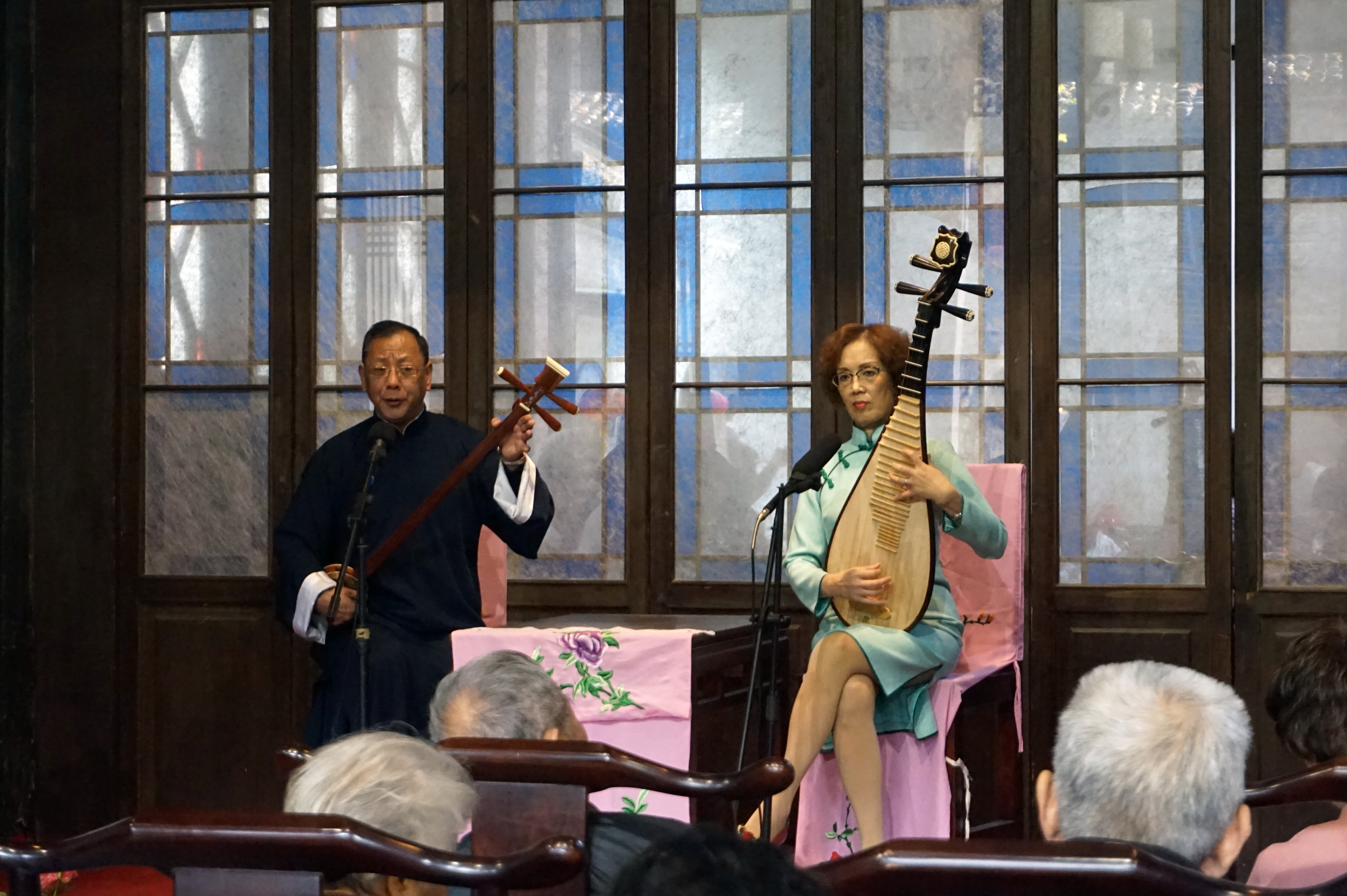 南浔丝业会馆评弹表演。